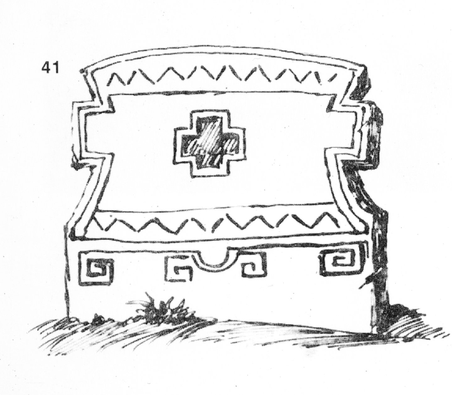 41. Кръст от сив песъчлив камък. Лицето му [е] украсено със зигзаговидни фризи, меандри и кръст. Размери: 60x37x7 см. Датира от 1847 г. Из гробищата под Калето в гр. Берковица. Скициран на 12.VIII.1930 г. (Т.13, обр. 47.)